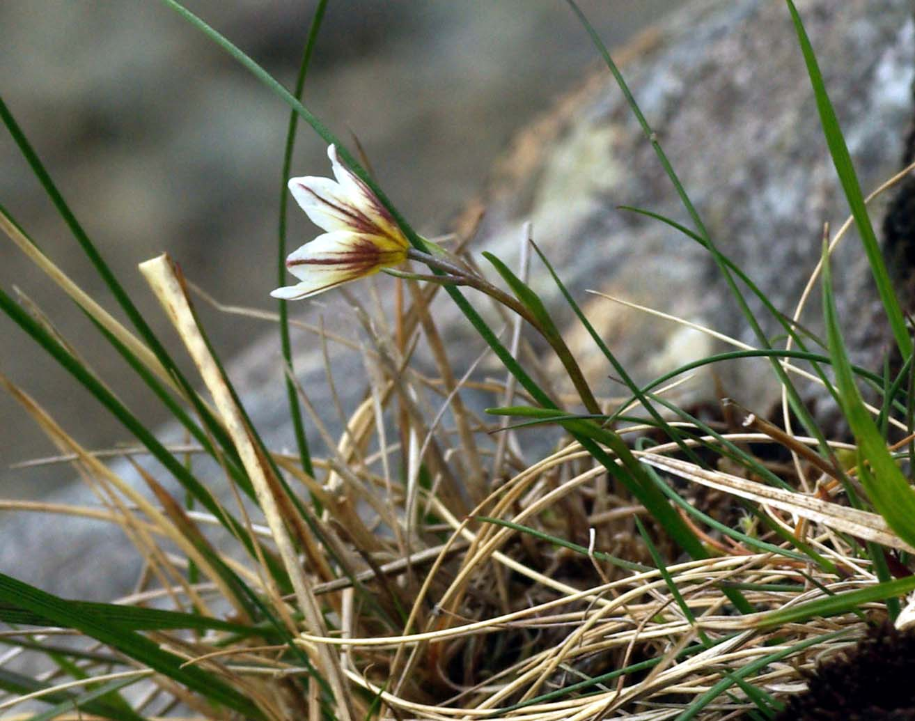 Lloydia serotina growing in Snowdonia